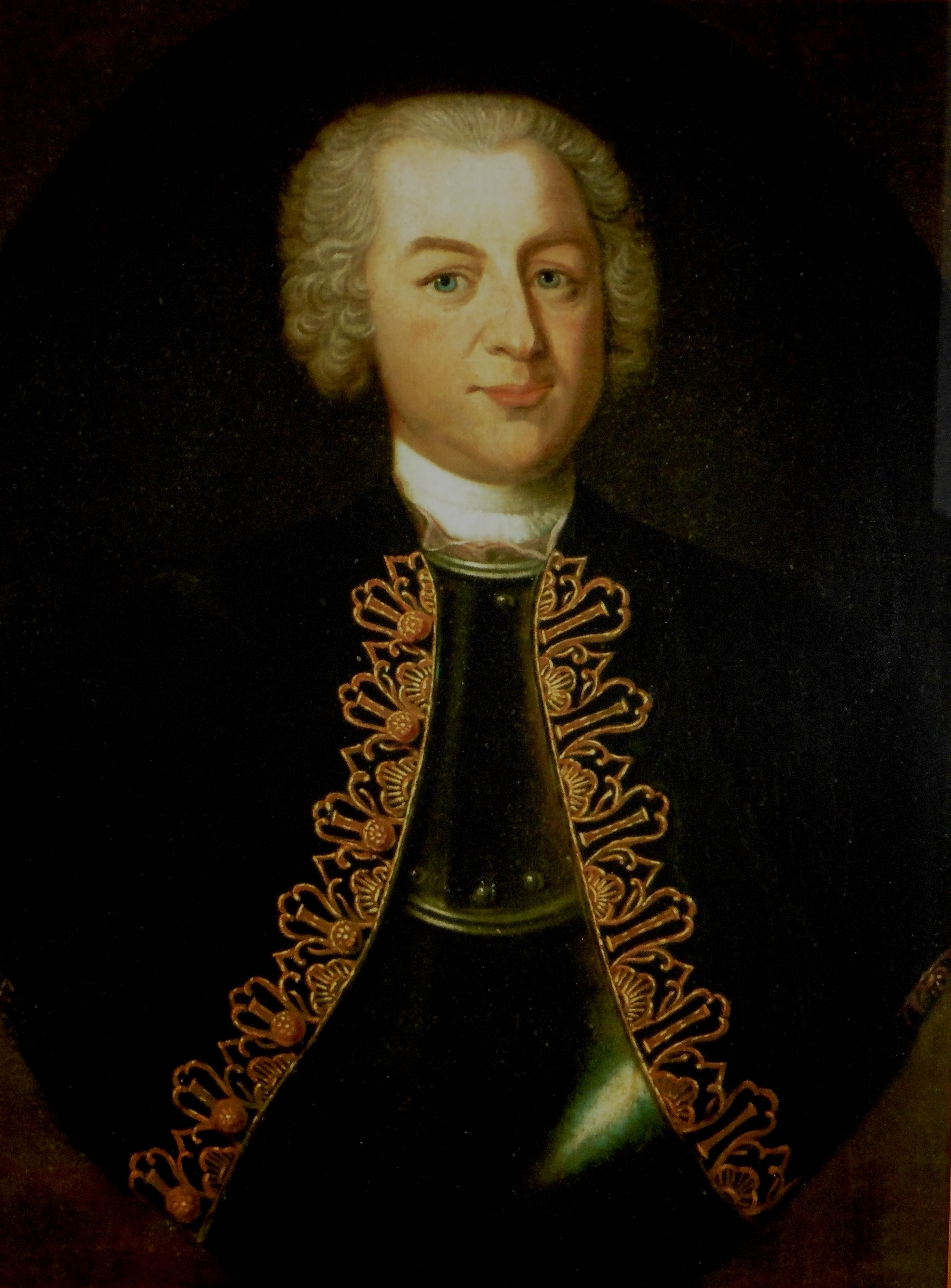 Johann Georg von Langen (1699-1776), German master of forestry and hunting / deutscher Forst- und Oberjägermeister.